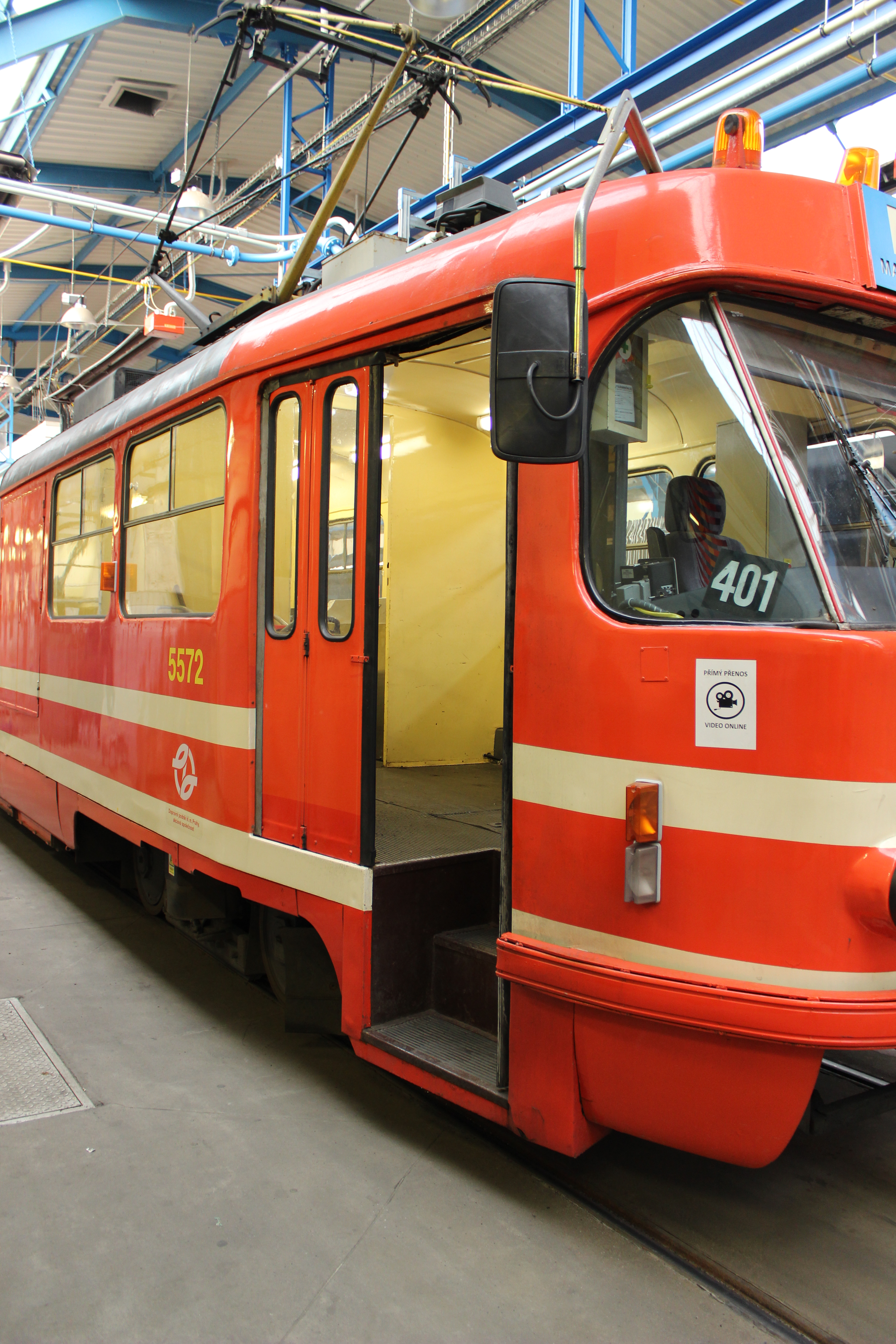 Pracovní tramvaj T3M evidenční číslo 5572. Vyfotografováno laskavostí pracovníků Dopravního podniku hlavního města Prahy – Milana Slunečka, Jiřího Štábla a Martina Brejši.